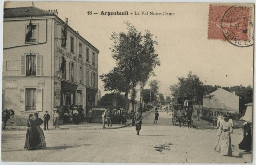 La route de Pontoise (actuelle RD 392) à Argenteuil vers 1910